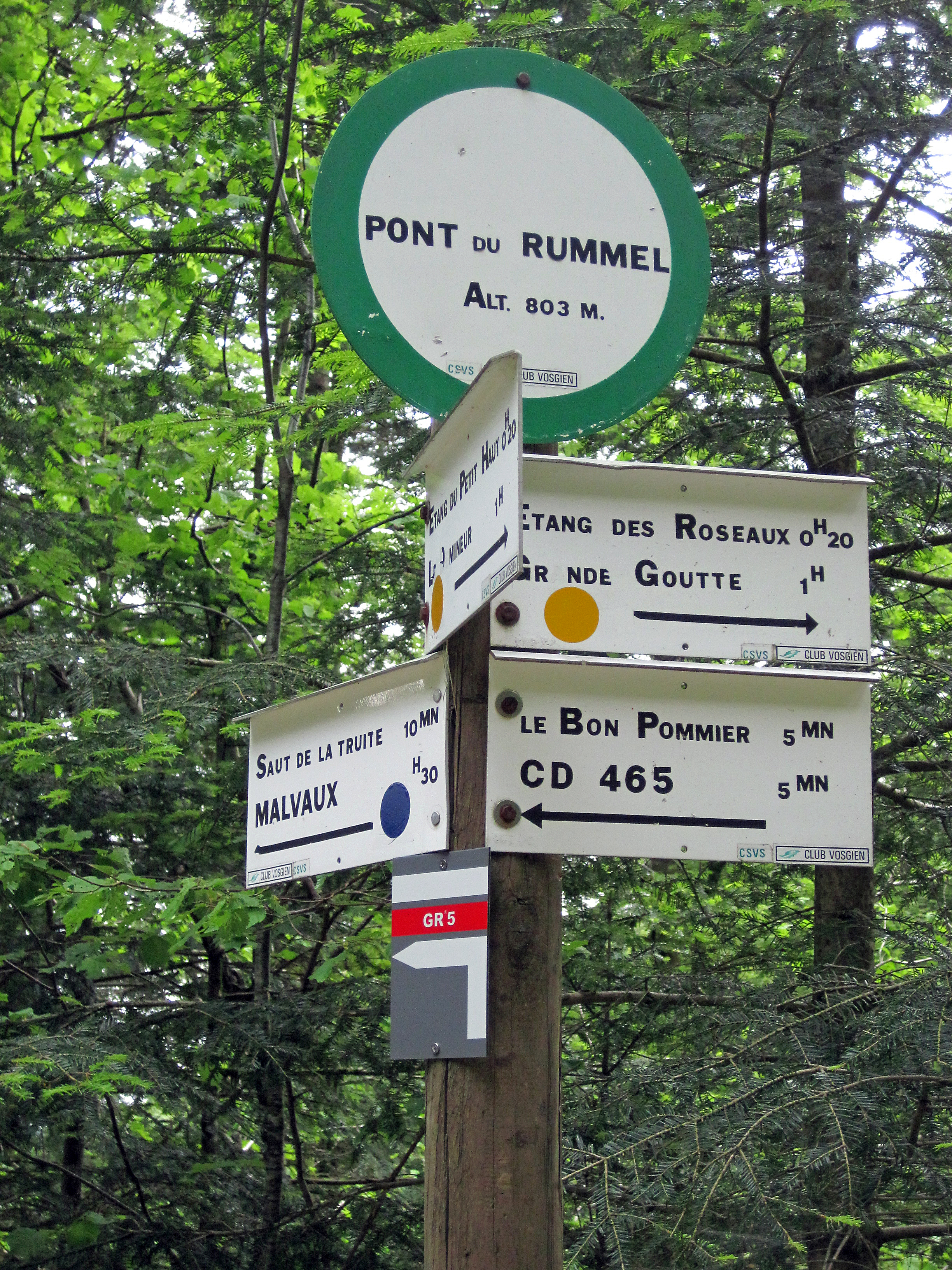 Exemple de balisage de randonnée typique du massif des Vosges : panneau de lieu-dit avec altitude, marques de couleurs pour itinéraires locaux avec indications directionnelles, balisage du GR5. Les panneaux mentionnent "CSVS" : club sous-vosgien des sentiers, et Club Vosgien, l'association régionale qui a élaboré le réseau des sentiers vosgiens.